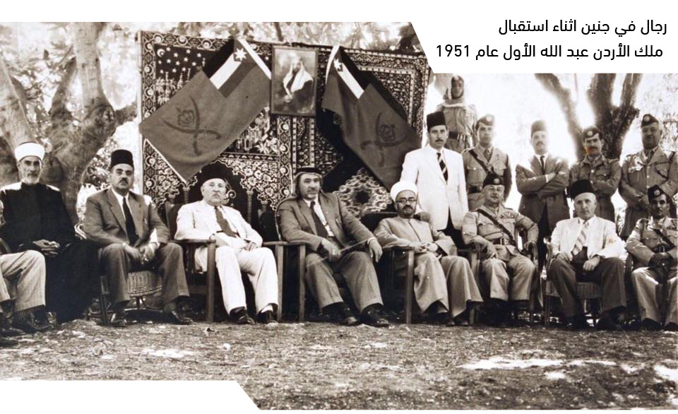 رجال في جنين عام 1951 اثناء استقبال ملك الإردن عبد الله الأول عند زيارته لمدينة جنين